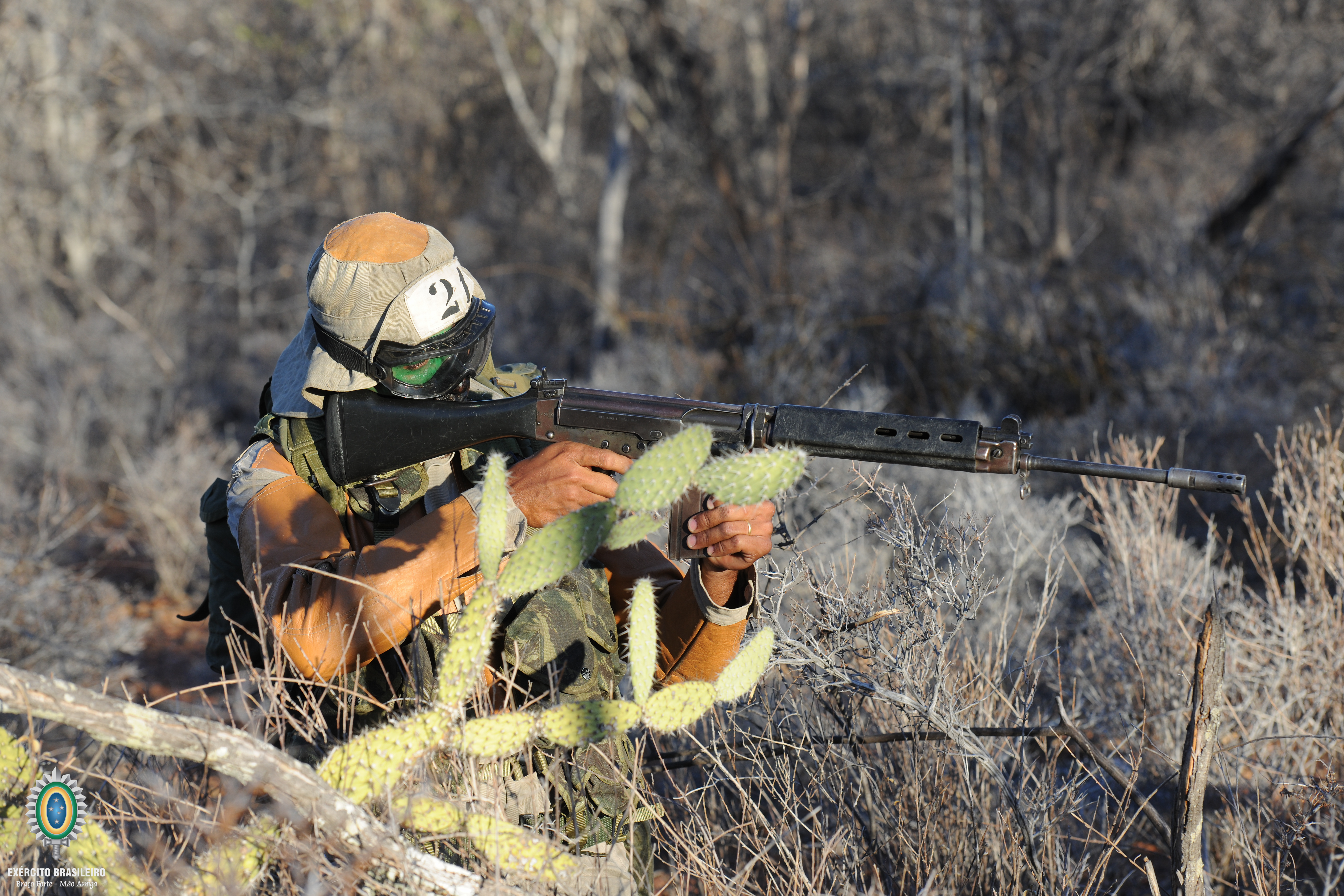 Foto: Ten Edvaldo/EB